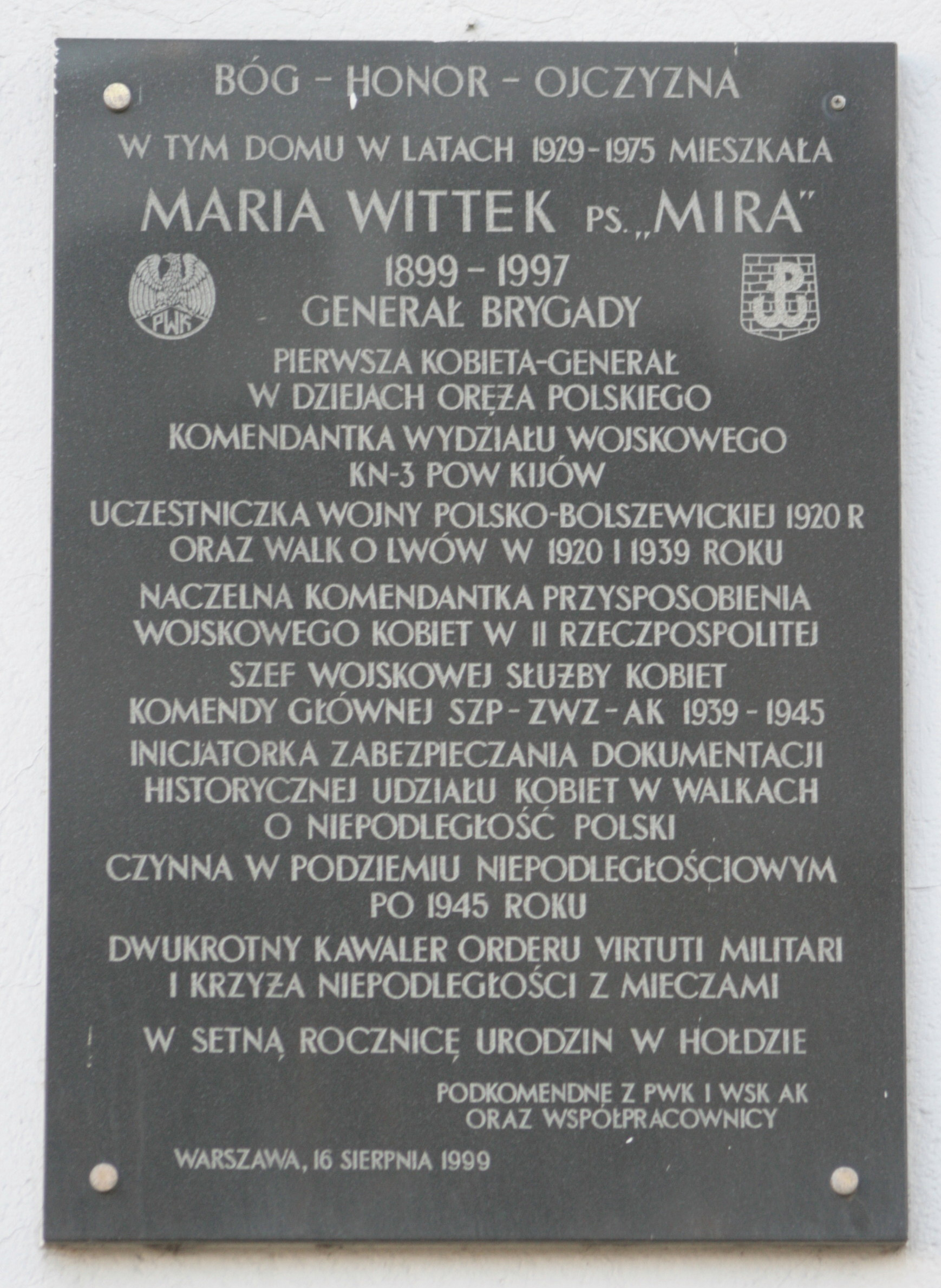 Tablica poświęcona Marii Witek na ścianie budynku przy Alei 3 Maja 2 w Warszawie